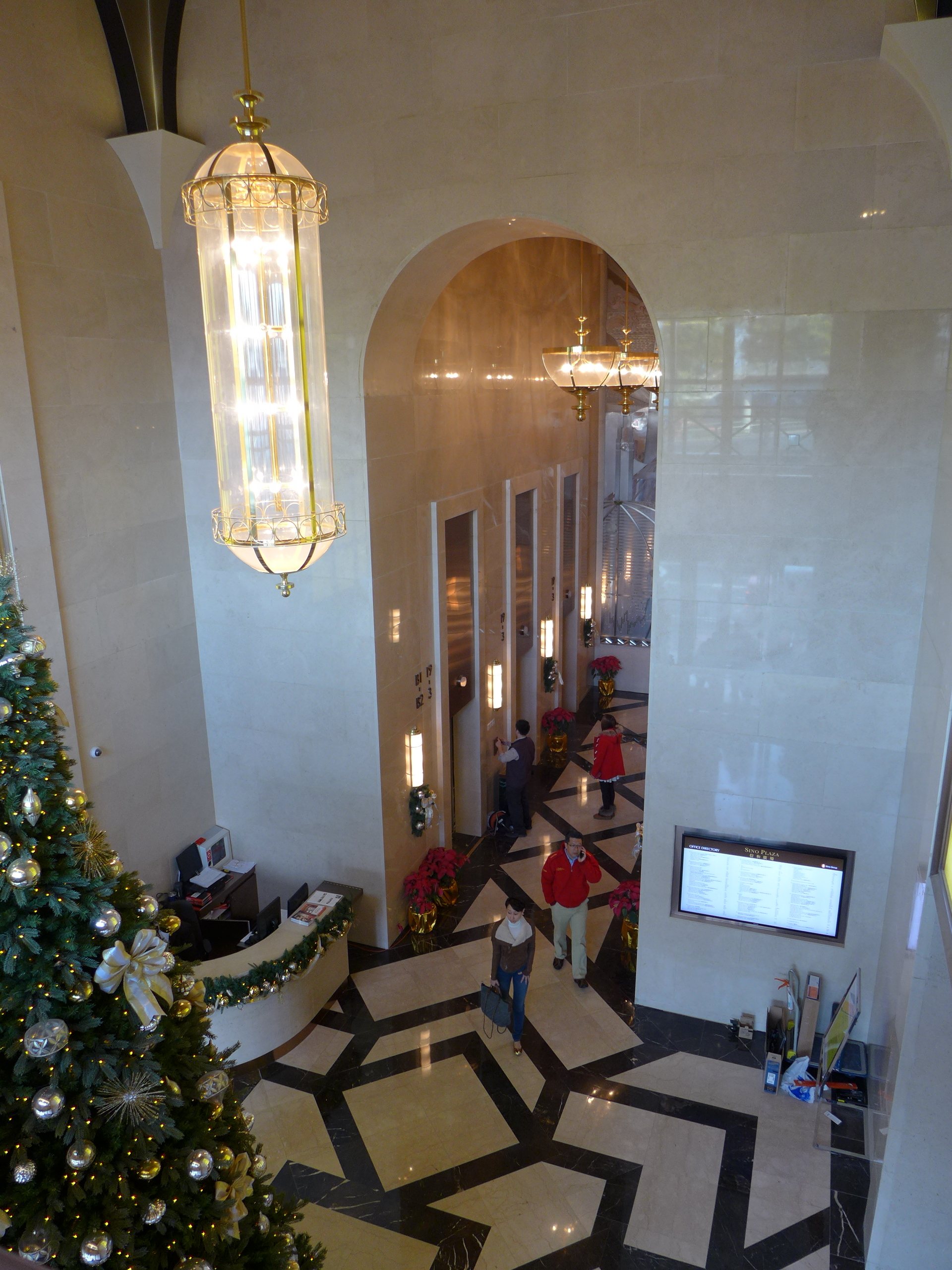 Sino Plaza Office lobby